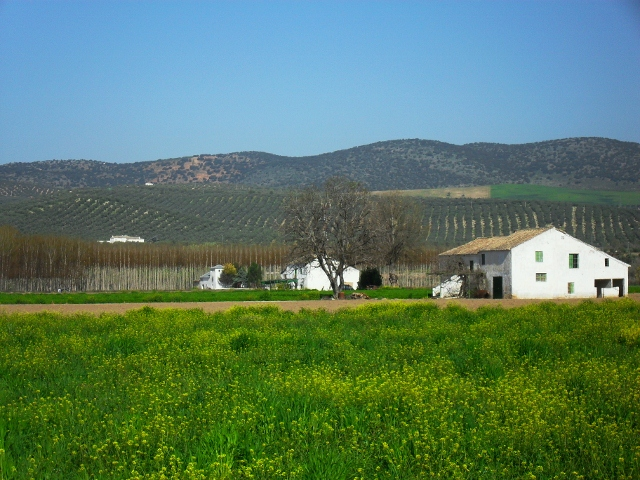 Vista de la Vega de Calardos (Huétor-Tájar)